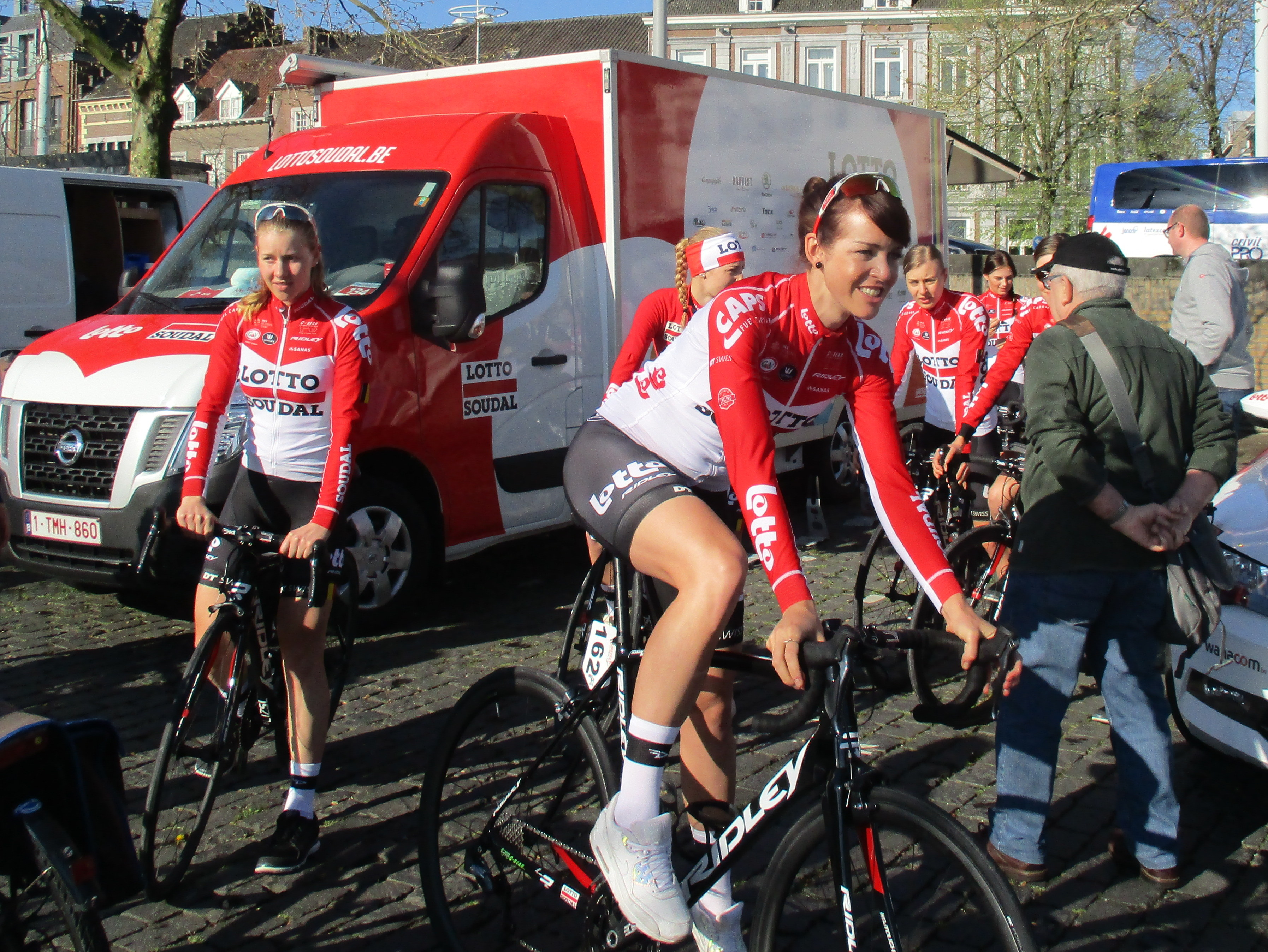 Start van de Amstel Gold Race Ladies Edition 2018 in Maastricht.